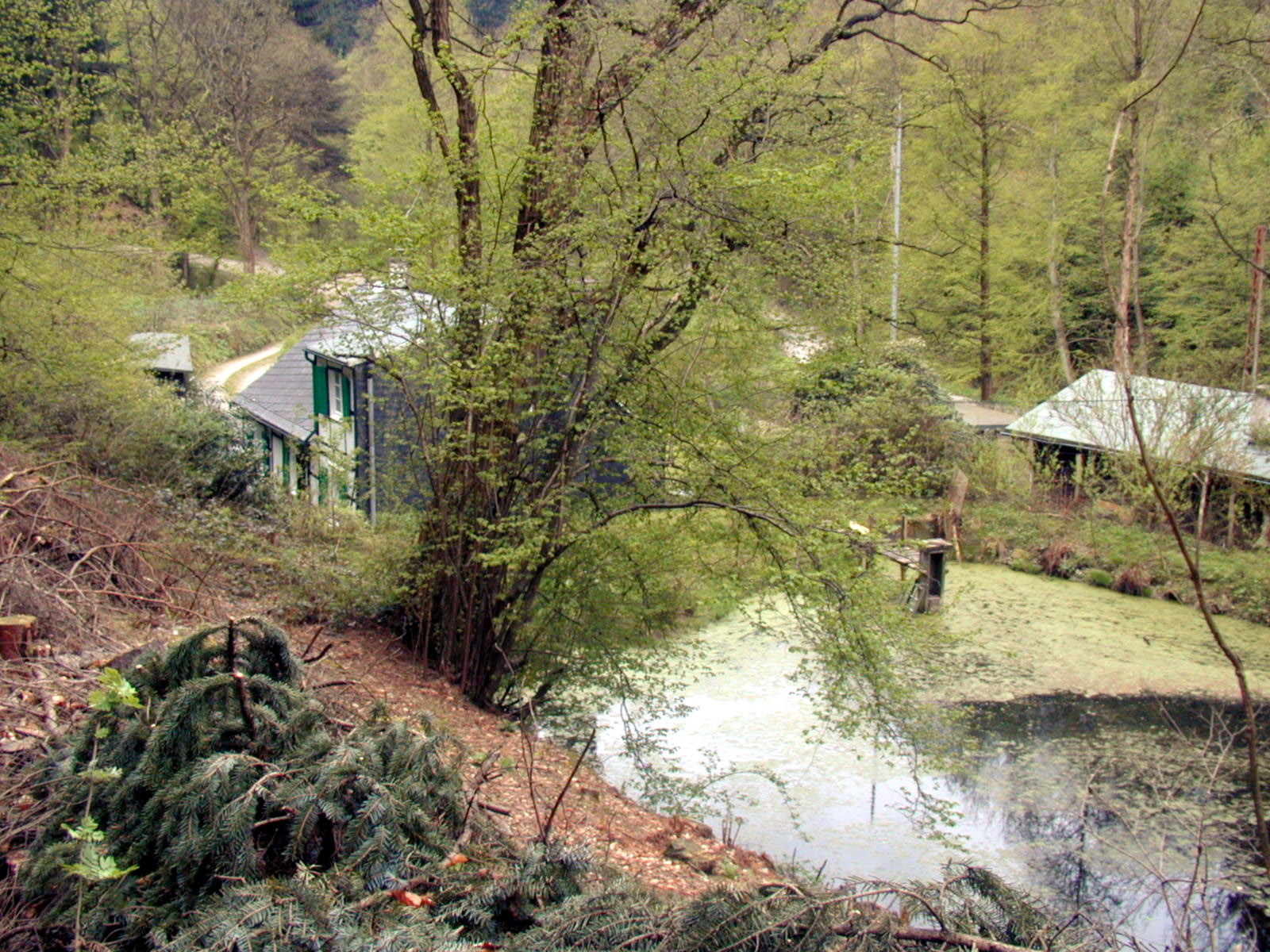 Bodendenkmal Hammerwüstung Nöllenhammer, Wuppertal